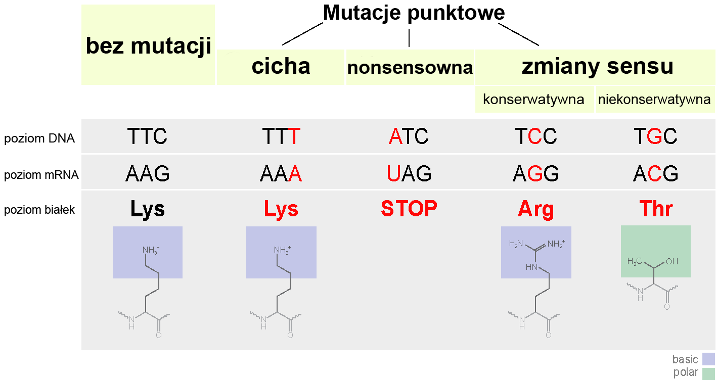 Typy mutacji punktowych z przykładami.